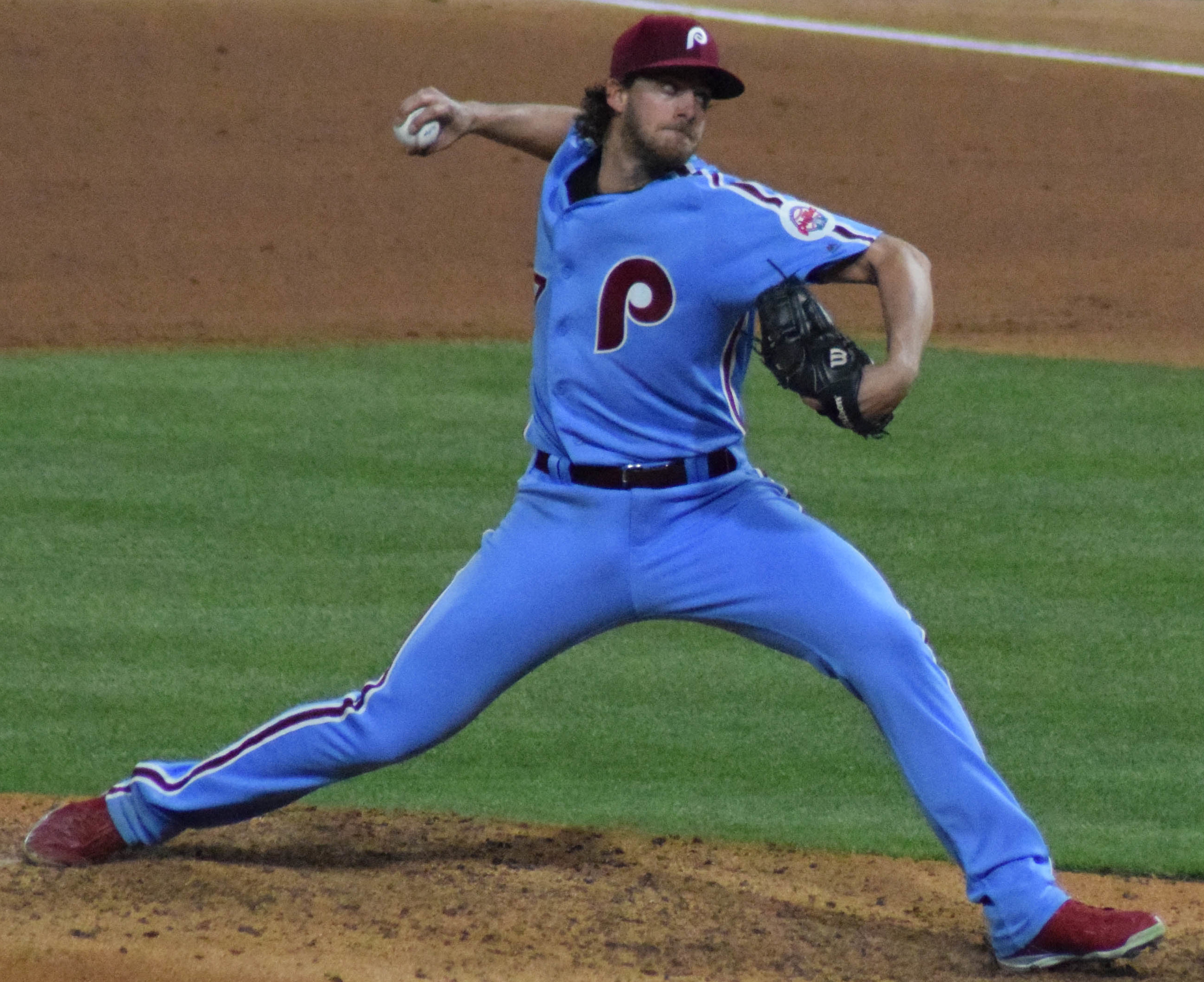 Aaron Nola